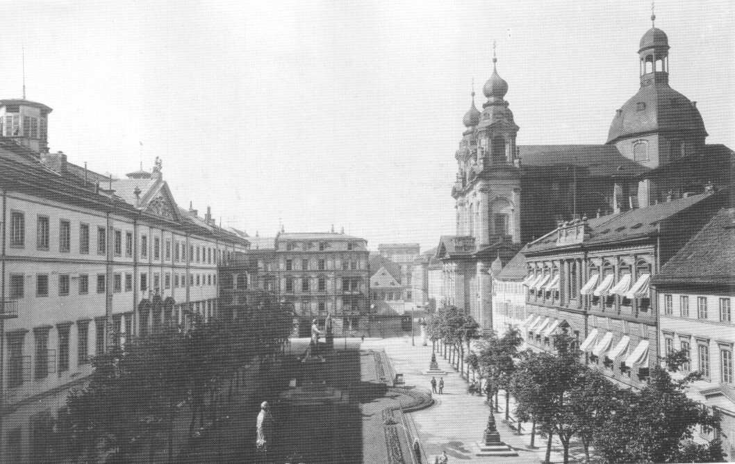 Mannheim, Schillerplatz, B3, mit Jesuitenkirche sowie Nationaltheater, um 1900. Rechts das Palais Zweibrücken